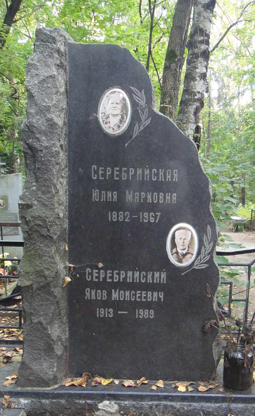 Могила Серебрийского